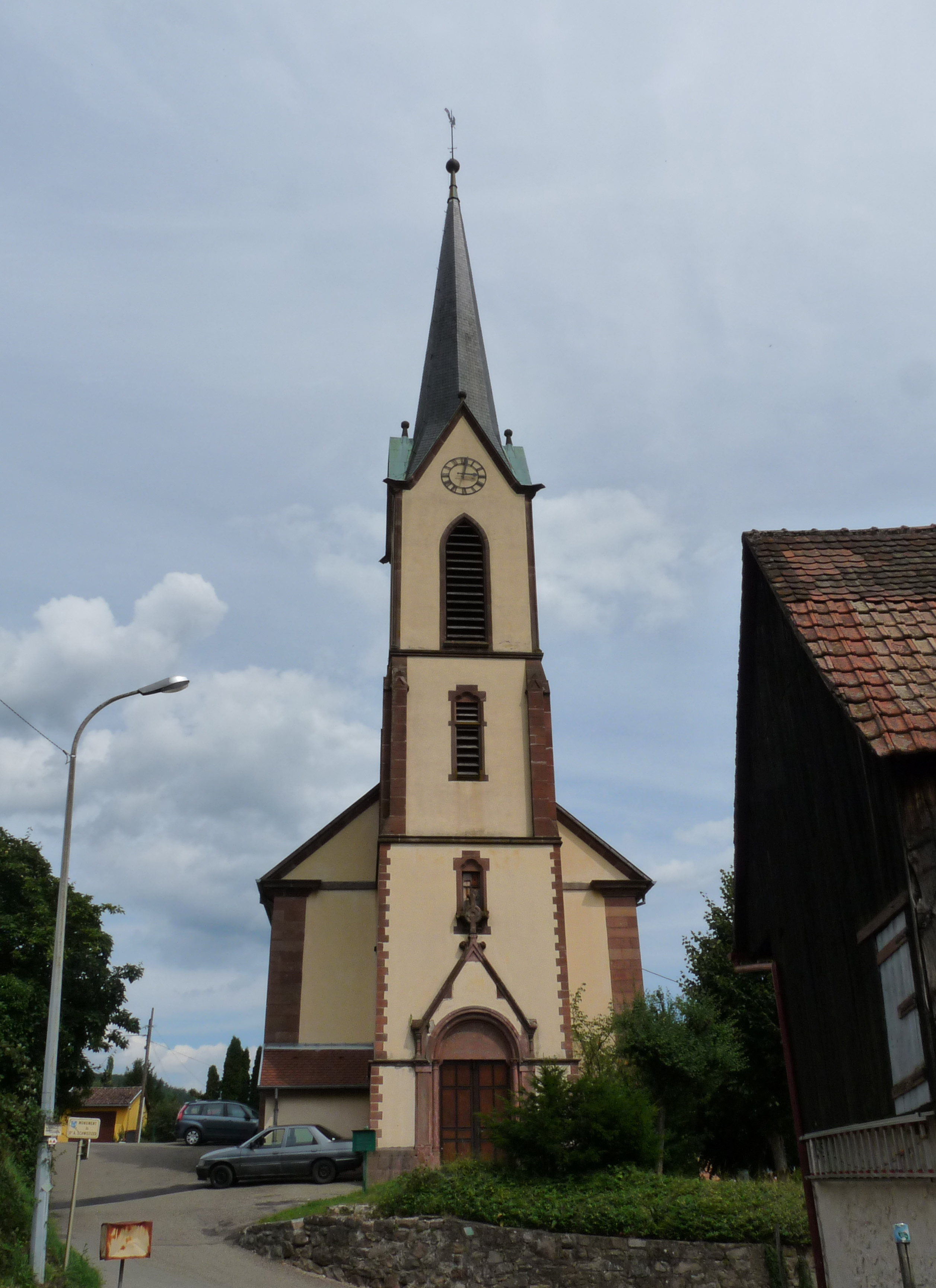 Eglise simultanée Saint-Himère de Gunsbach (Haut-Rhin)